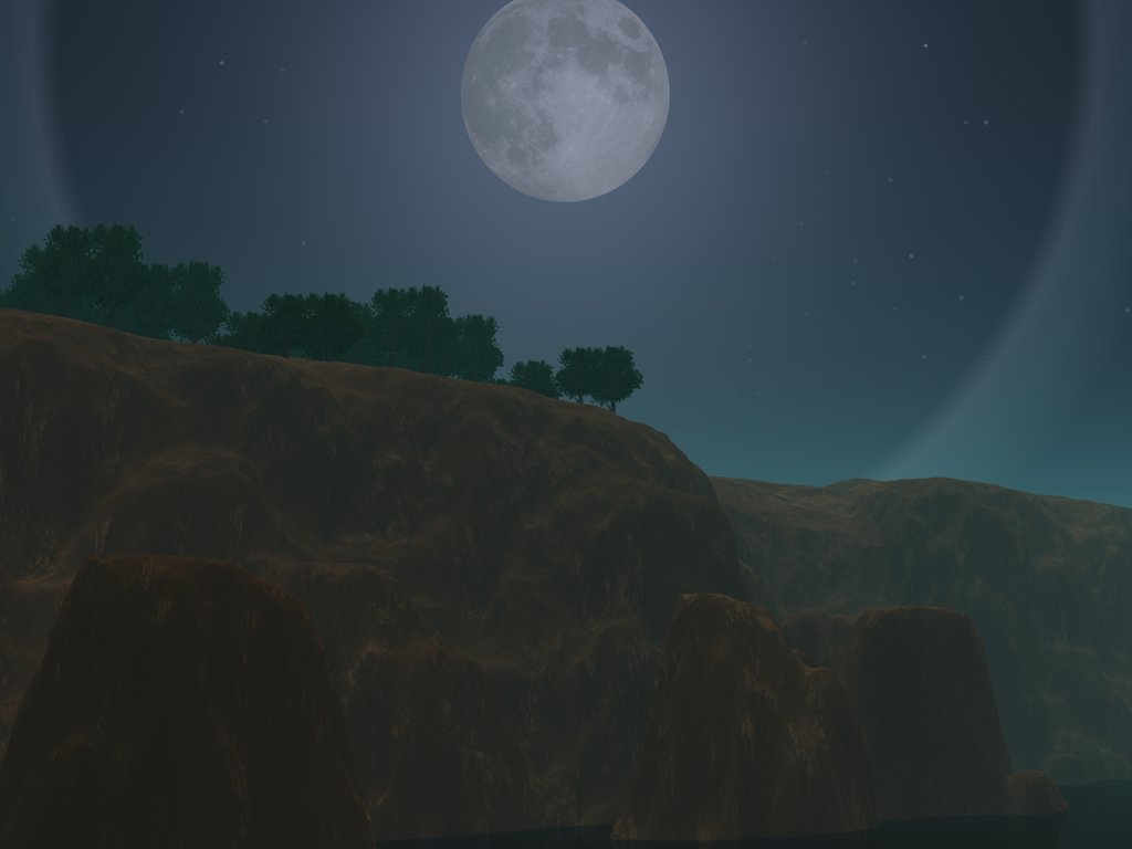 Renderbild mit dem 3D-Landschaftsgenerator Bryce